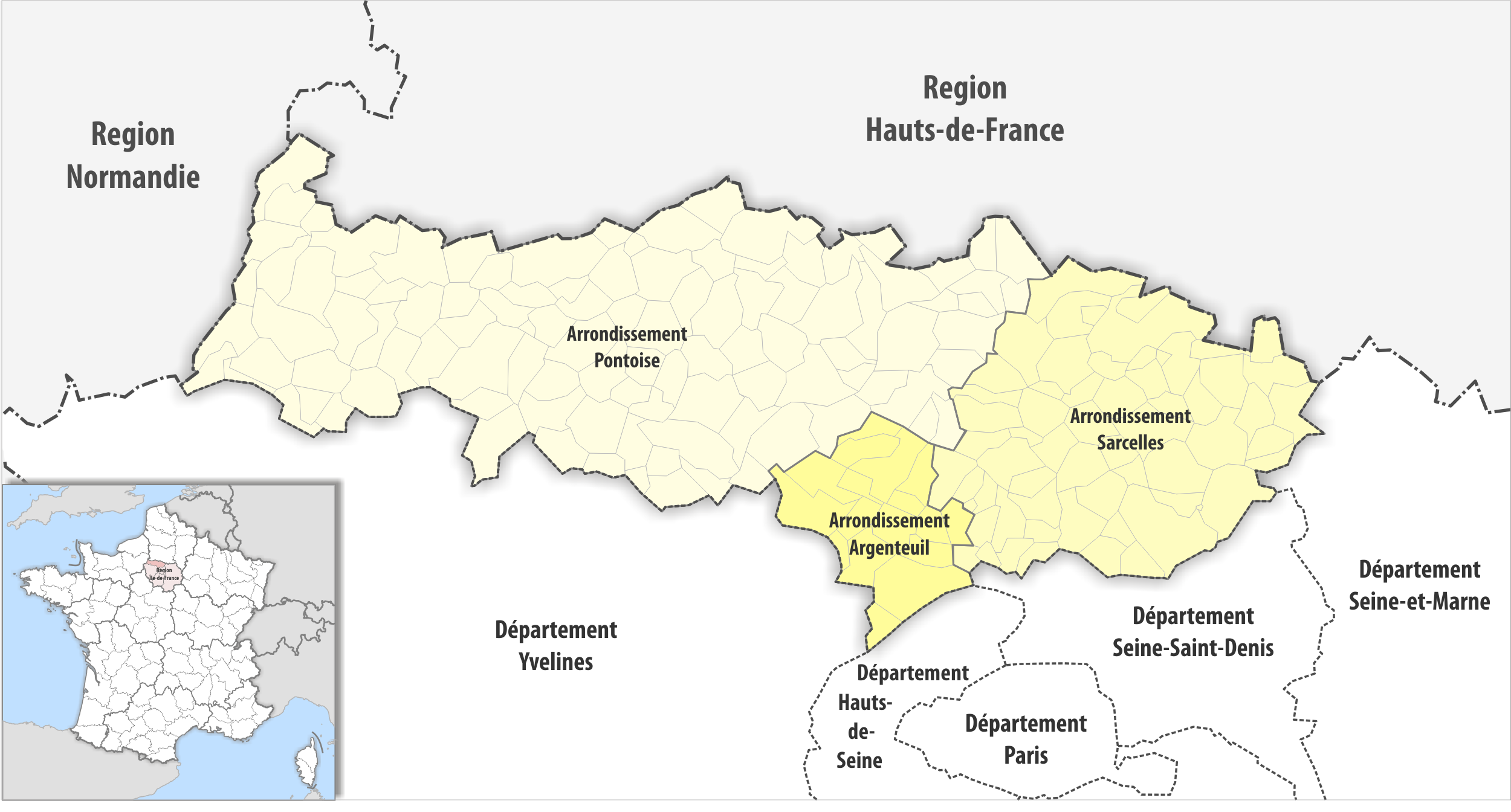 Gemeinden und Arrondissemente im Departement Val-d'Oise